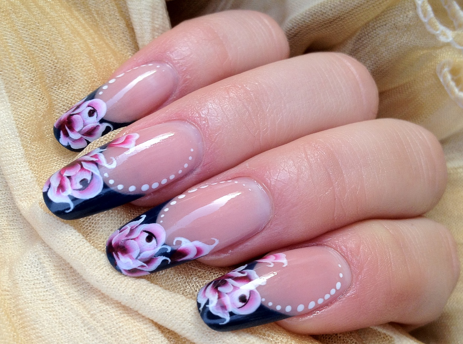 Снимката е на модел направен от майстор по ноктопластика Стела Георгиева Stella Nails